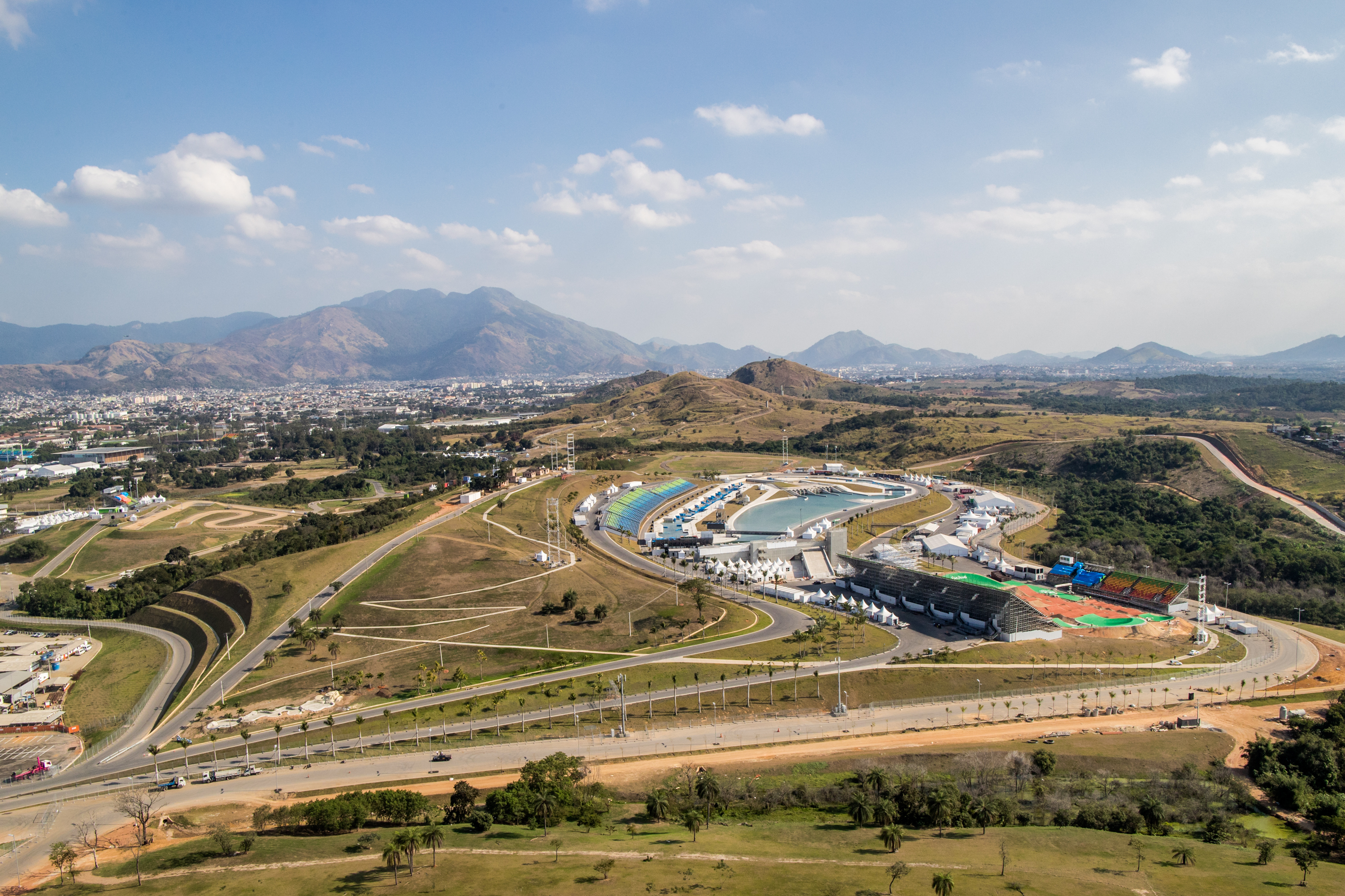 Visão geral do Parque Radical, com as instalações do ciclismo BMX, ciclismo mountain bike e canoagem slalom.